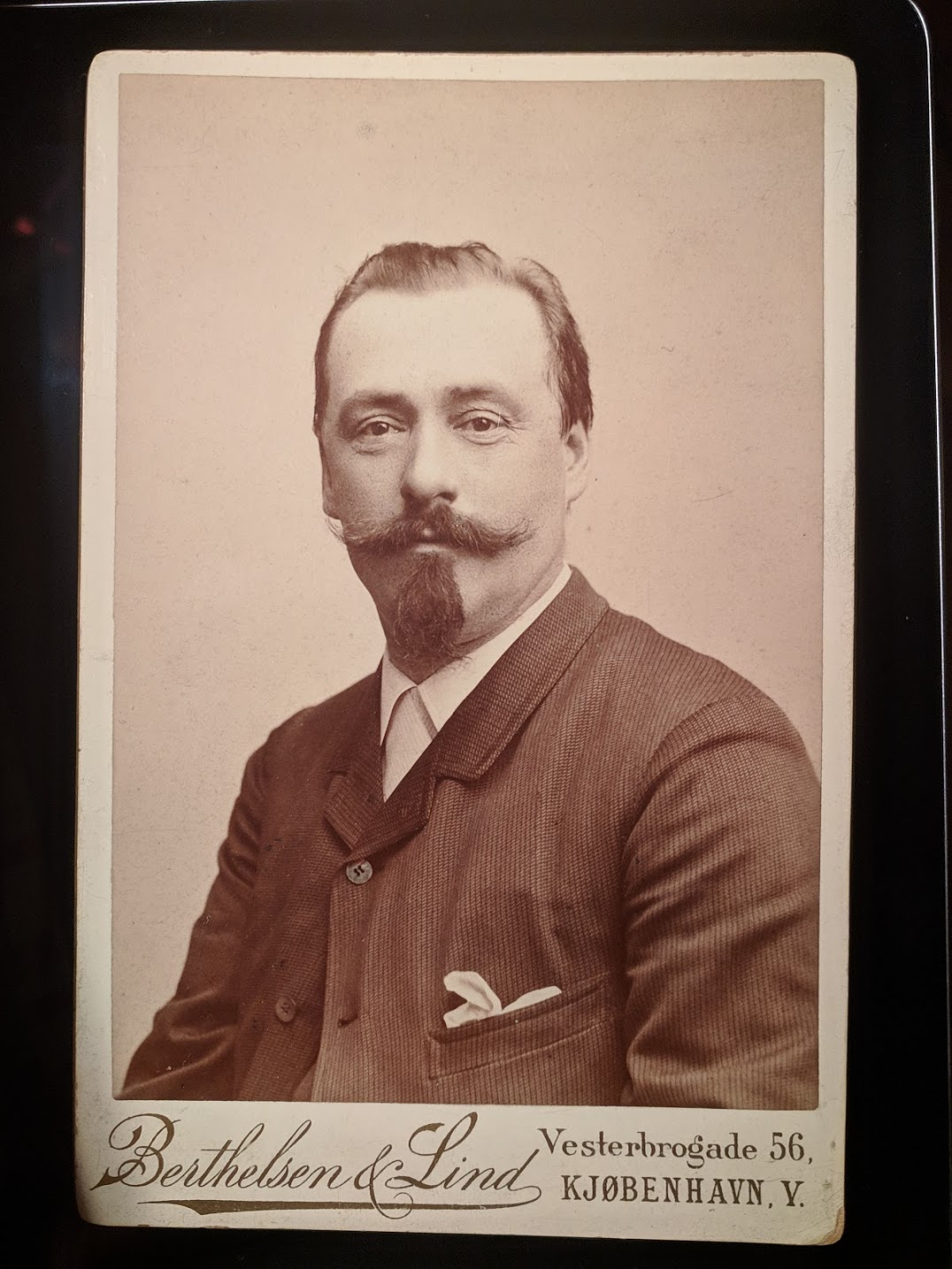 Portræt af Axel Emil Guldbrandsen. Dateret 1890.